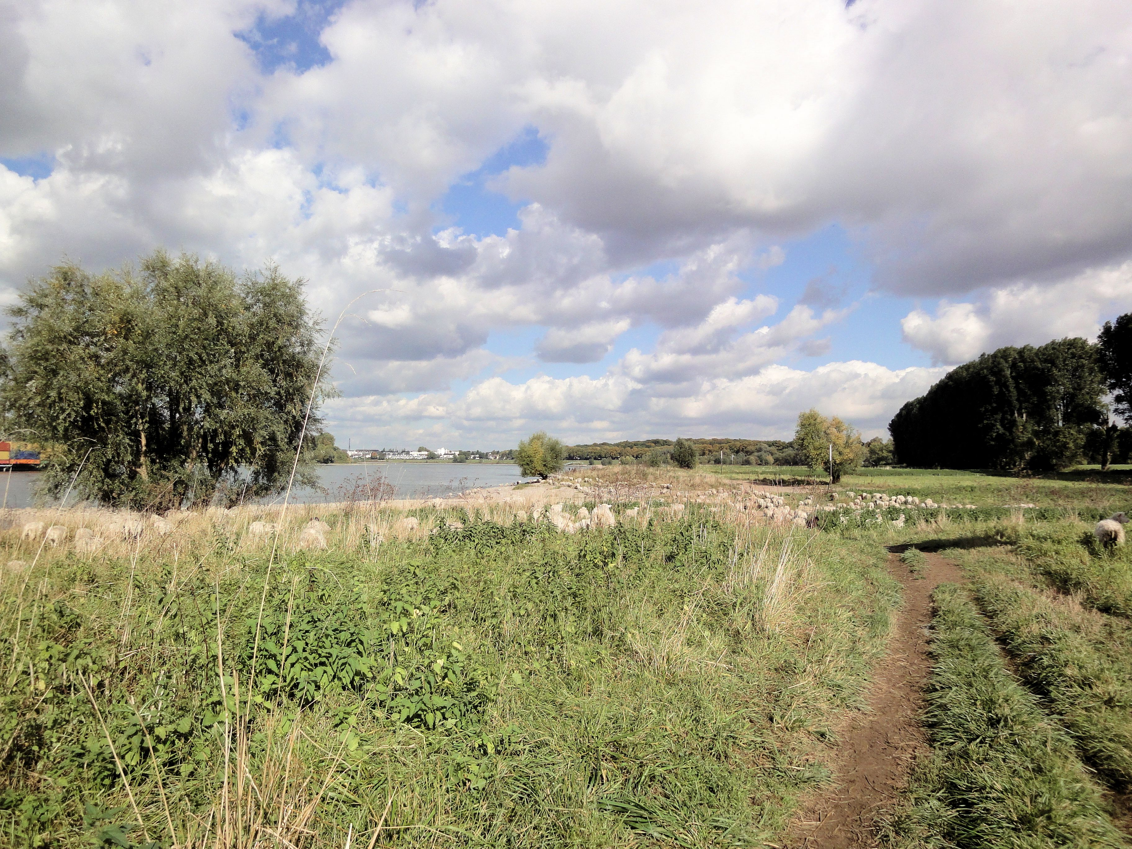 Schafherde in den Rheinauen in Düsseldorf-Urdenbach, abgebildeter Bereich im Landschaftsschutzgebiet „Stadtgebiet Düsseldorf“ (in der Nähe vom Naturschutzgebiet „Urdenbacher Kämpen“, hinter der Baumreiche rechts)